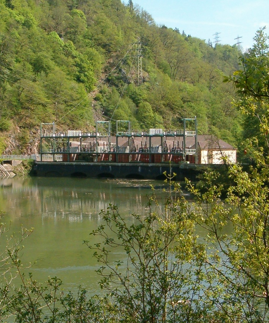 Stausee Witznau im Schwarzatal. Blick auf die Staumauer mit integriertem Turbinenhaus von der Seeseite.